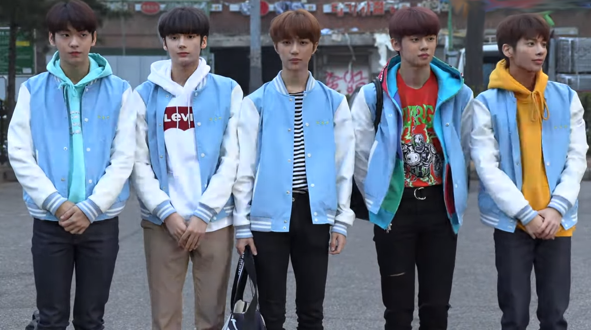 투모로우바이투게더 (TOMORROW X TOGETHER) TXT @ 190315 뮤직뱅크 출근길